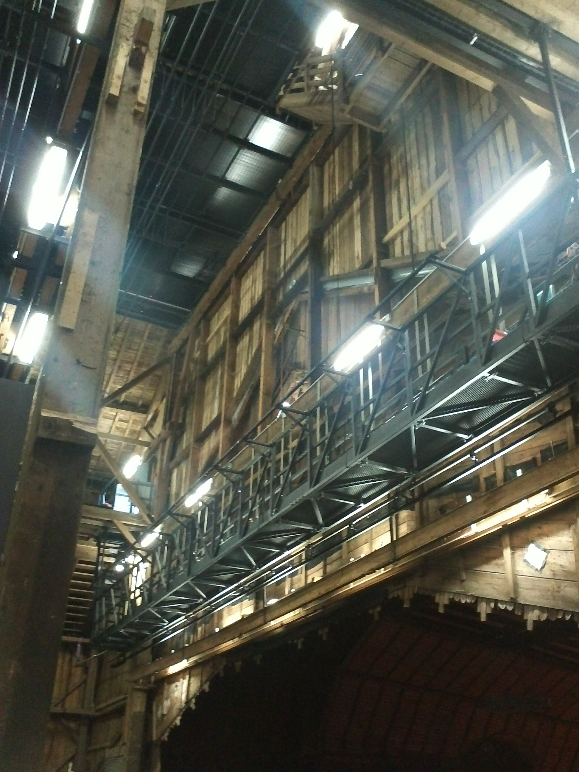 Théâtre du Peuple (Classé) .